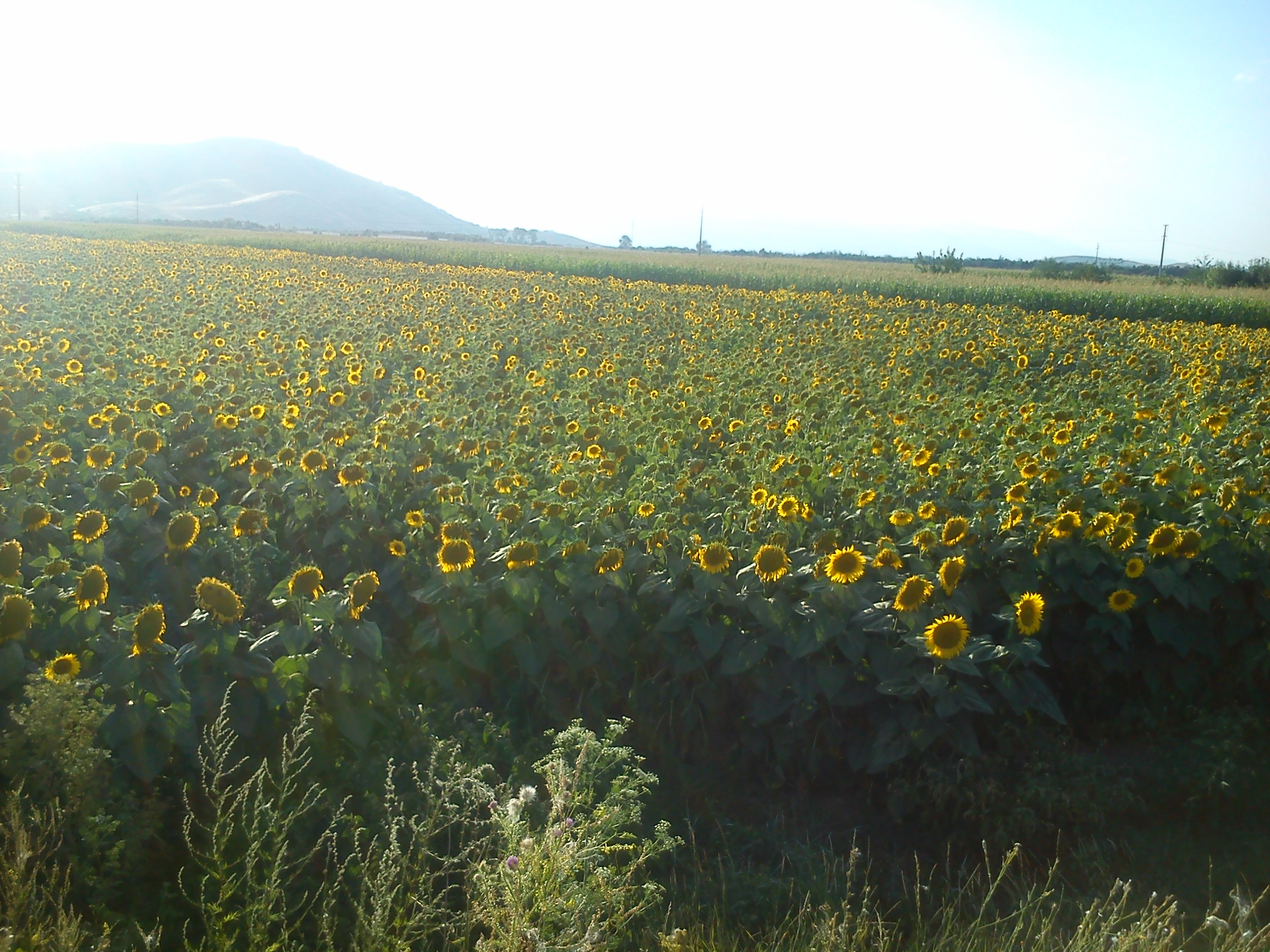 Сончоглед во околината на Могила, Битола